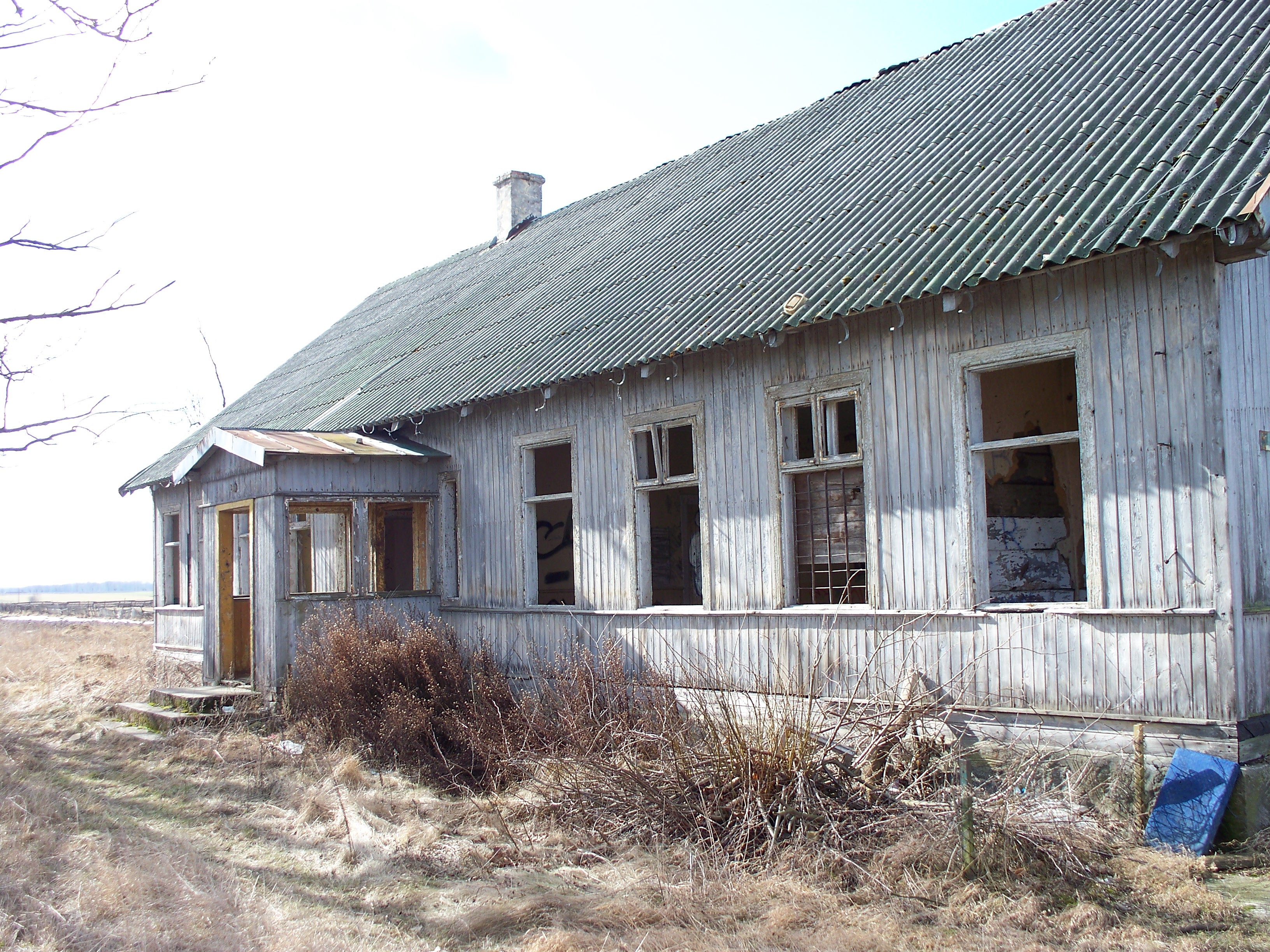 Budynek ten znajduje się po prawej stronie jadąc z Brzósk Starych. W okresie międzywojennym działała tu szkoła powszechna, istniała od 1922 roku. Początkowo miała status szkoły jednoklasowej, a od 1923 roku była tu szkoła dwuklasowa. Była to jedyna szkoła posiadająca własny budynek szkolny, wszystkie inne ówczesne szkoły na terenie obecnej gminy posiadały wynajęte budynki – z L. Zugaj, Historia gminy Wysokie Mazowieckie. Wysokie Mazowieckie 2008 r. s. 39-40.